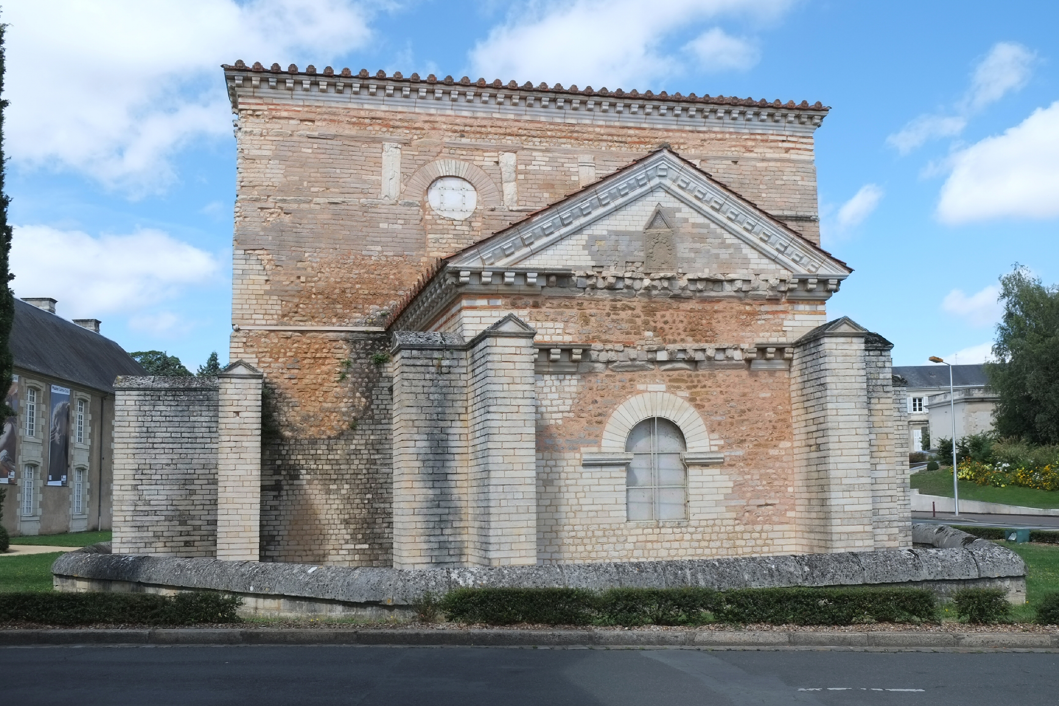 Baptistère Saint-Jean Poitiers Vienne France